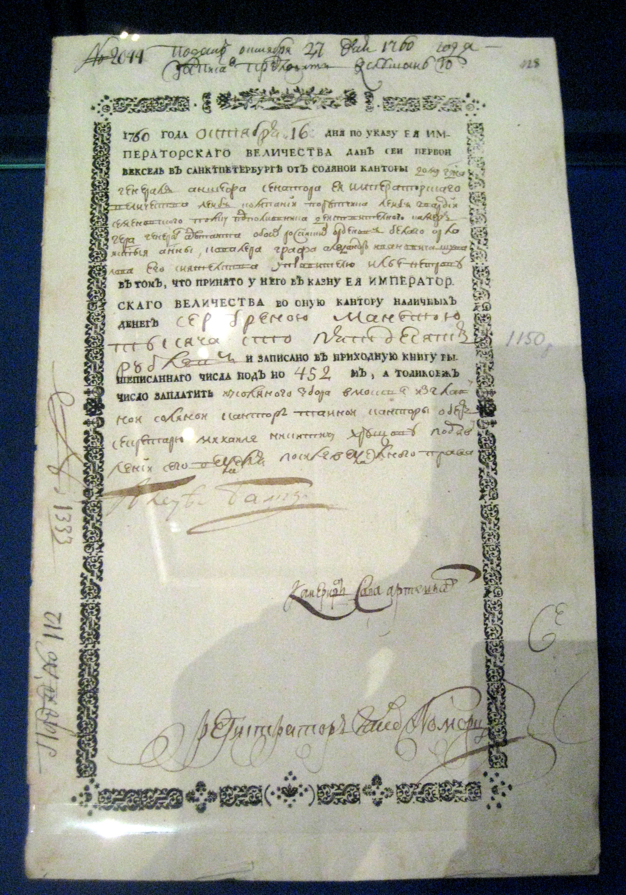 Вексель Соляной конторы в Санкт-Петебурге. 16 октября 1760 г. ГИМ. Выдан графу А.И. Шувалову для получения денег в главной соляной конторе в Москве на сумму в 1150 рублей серебряной монетой.